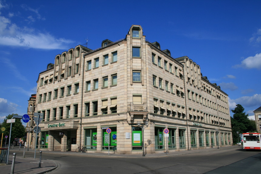 Die Filiale der Dresdner Bank, Gustav-Schickedanz-Straße 17, Ecke Bahnhofsplatz. Vorher stand hier die Sahlmannvilla, an die nur noch ein historisches Balkon-Element erinnert.